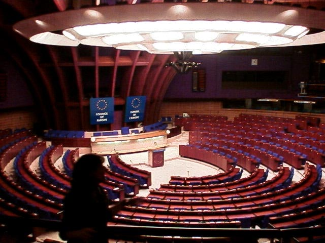 Vergaderzaal van de Raad van Europa